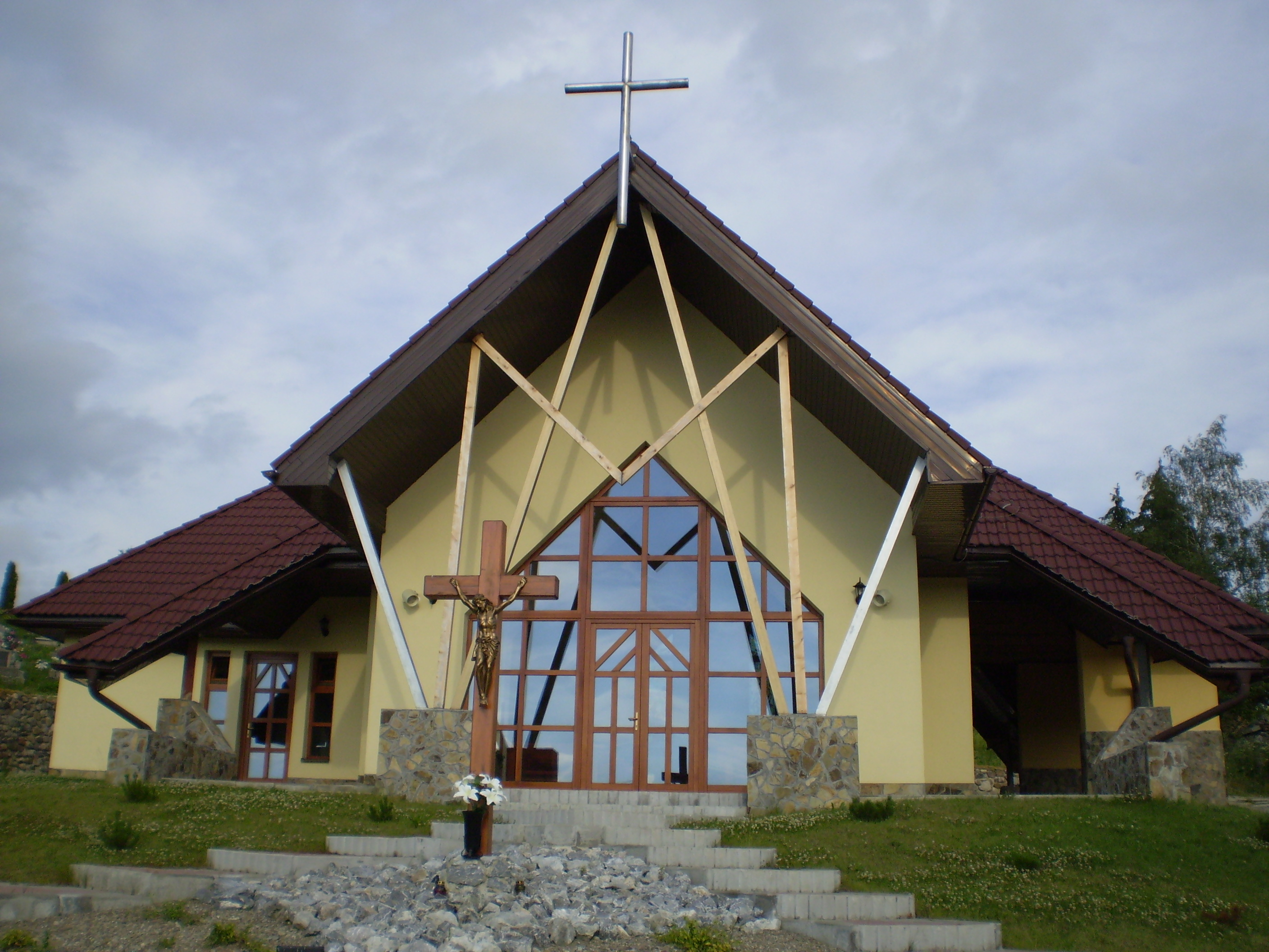 Dom nadeje Lubotin